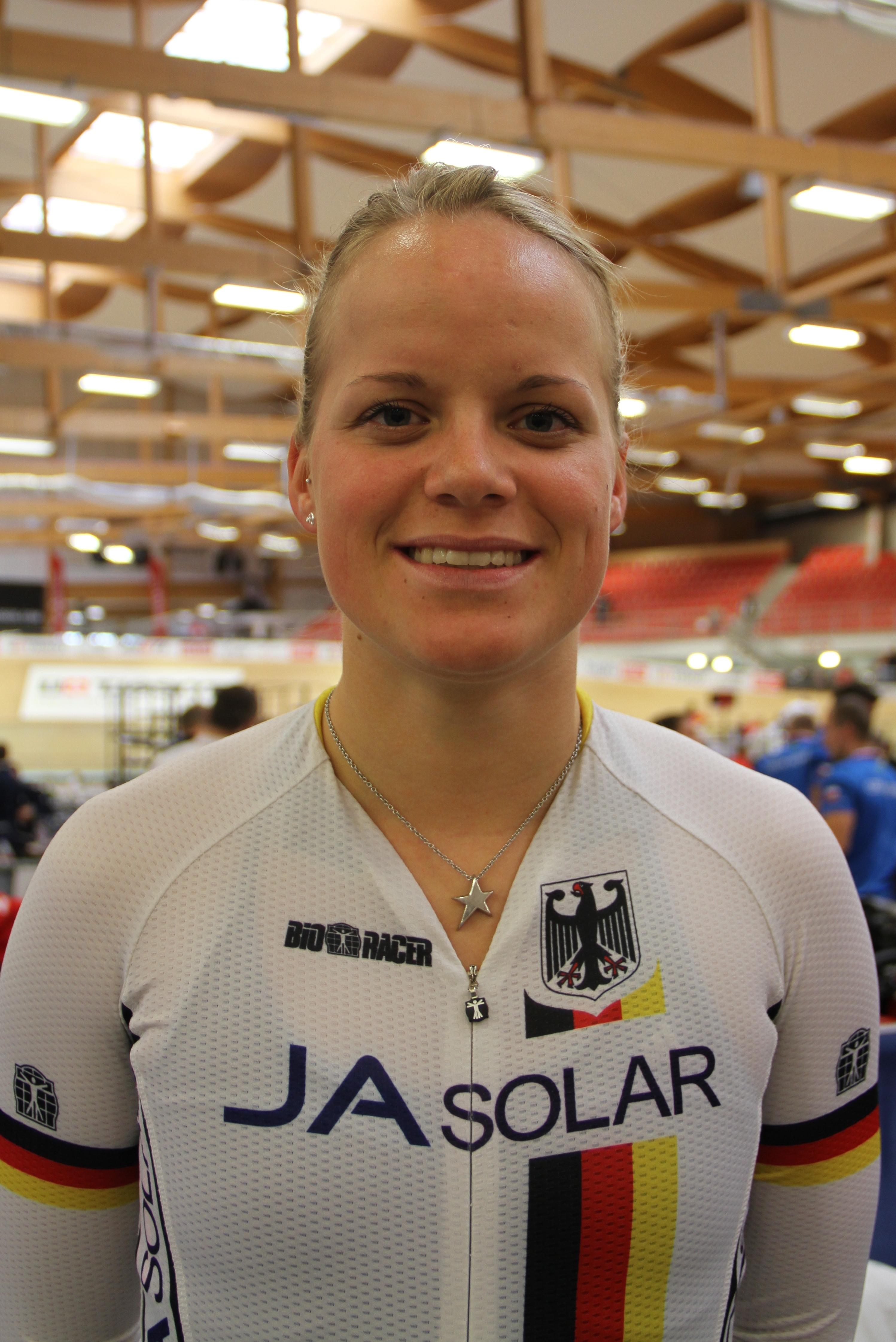 Gudrun Stock, deutsche Radsportlerin The making of this document was supported by the Community-Budget of Wikimedia Germany.